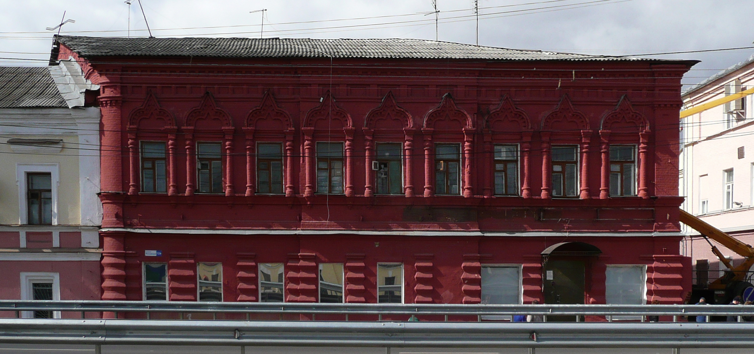 Дом Градусовой: проспект Московский, 12а, Ярославль, Ярославская область